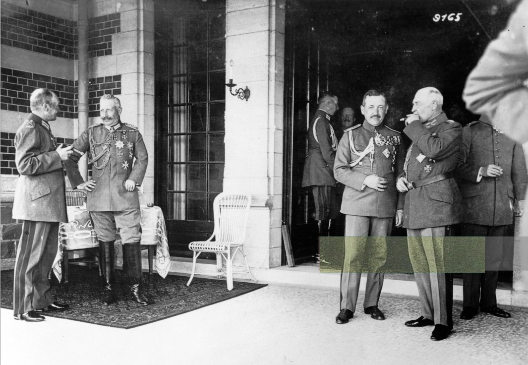 Le haut commandant allemand à la Villa du Neubois (Spa) en 1918 (durant la première guerre mondiale). Roi de Saxe, Guillaume, empereur d'Allemagne, le Major Gantcheff, le général Ludendorff.